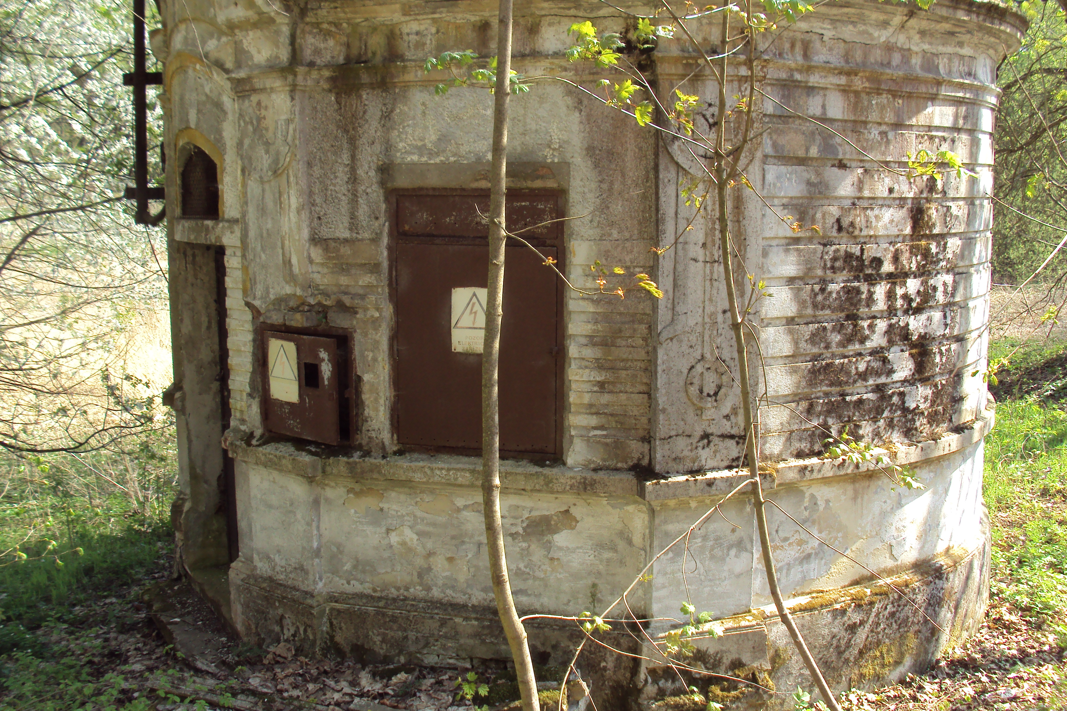 V údolí Pramenný důl na žluté trase, katastr Dražejova, v PP Horní Liběchovka je tato stavba, uvnitř proudí voda